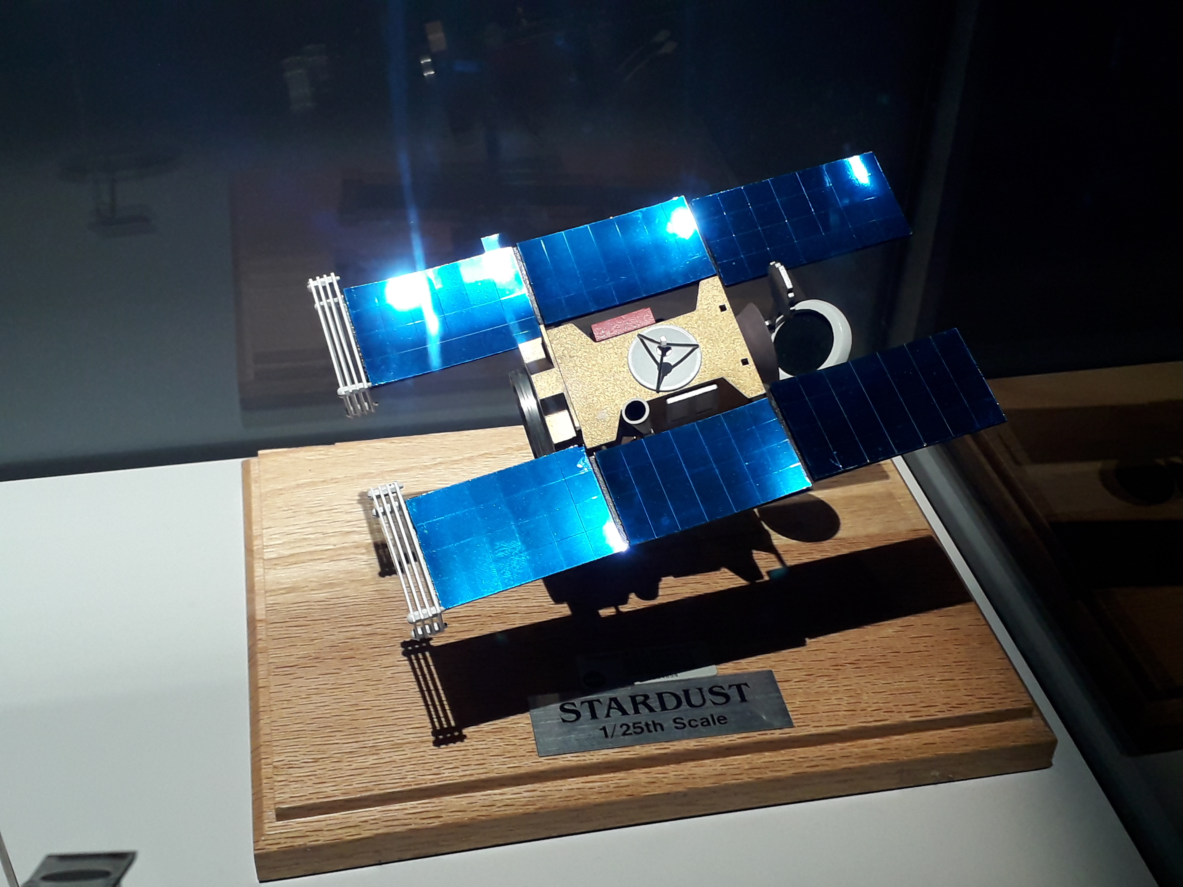 Maquette de la sonde Stardust lancée par la NASA et qui a recueilli des poussières de la comète Wild 2 en janvier 2004 avant de les rapporter sur Terre. Exposée à Paris à l'occasion de l'exposition "Météorites", dans le bâtiment de la grande galerie de l'évolution, au Muséum national d'histoire naturelle de Paris (18 octobre 2017 - 10 juin 2018).